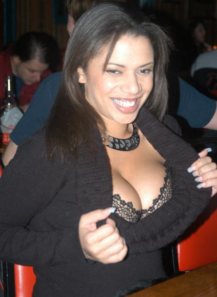 Jan 17 2006: Porn Star Karaoke